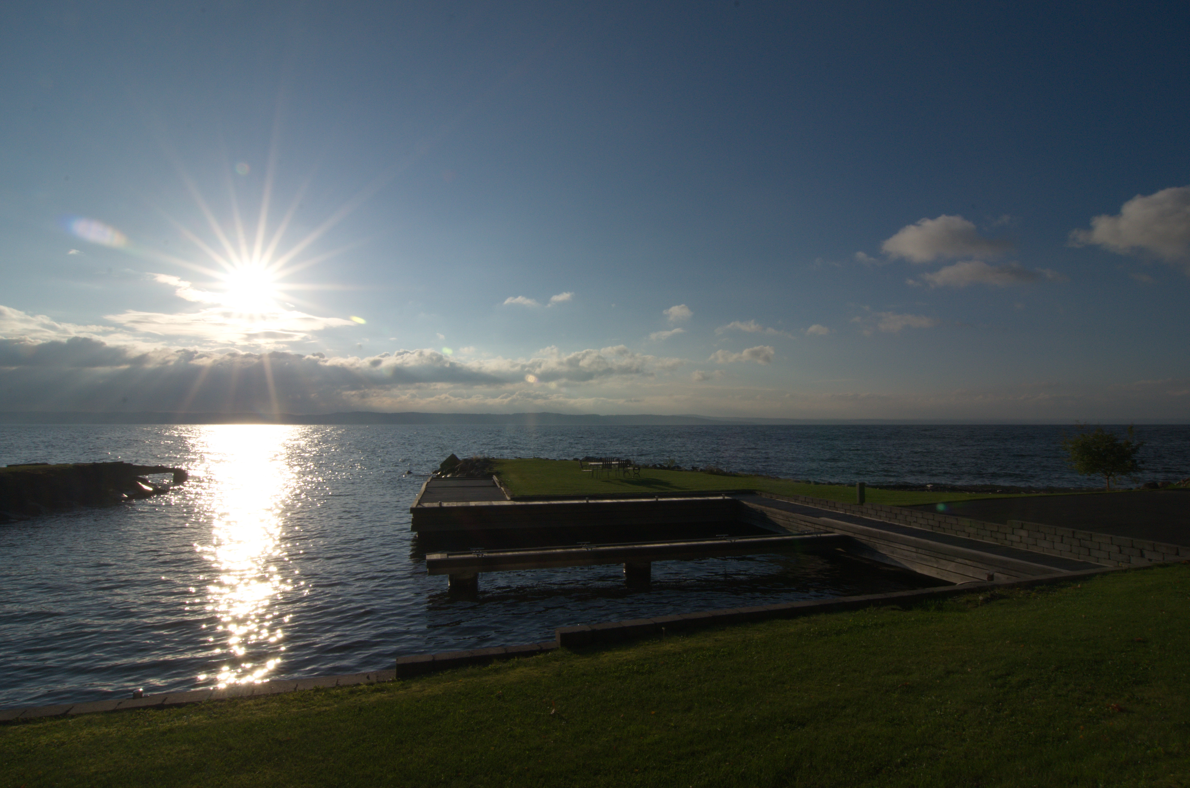 Юго-восточное побережье озера Веттерн.